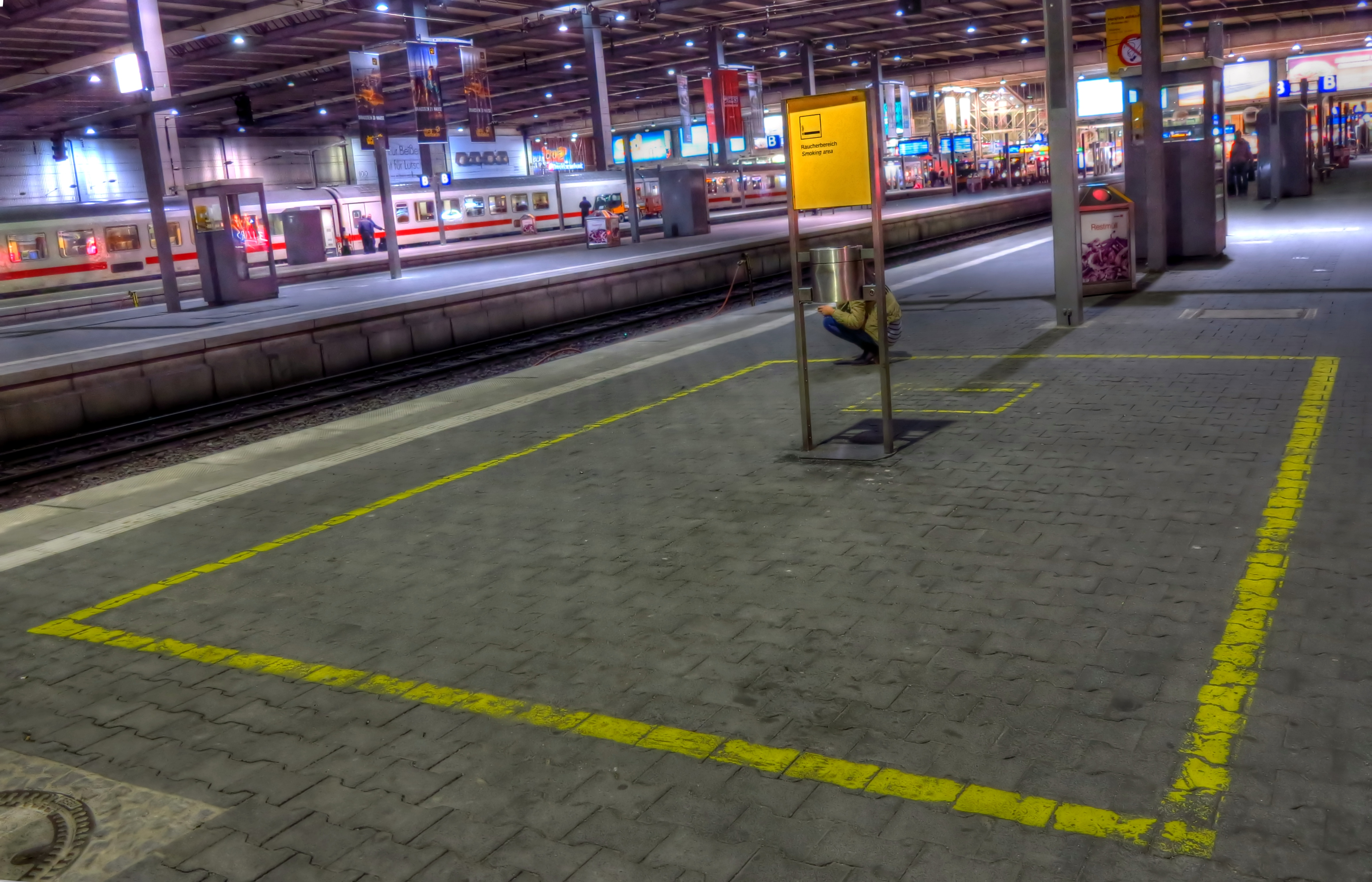 Deutschland, Bayern, München, Hauptbahnhof, Gleis 12/13, Raucherbereich